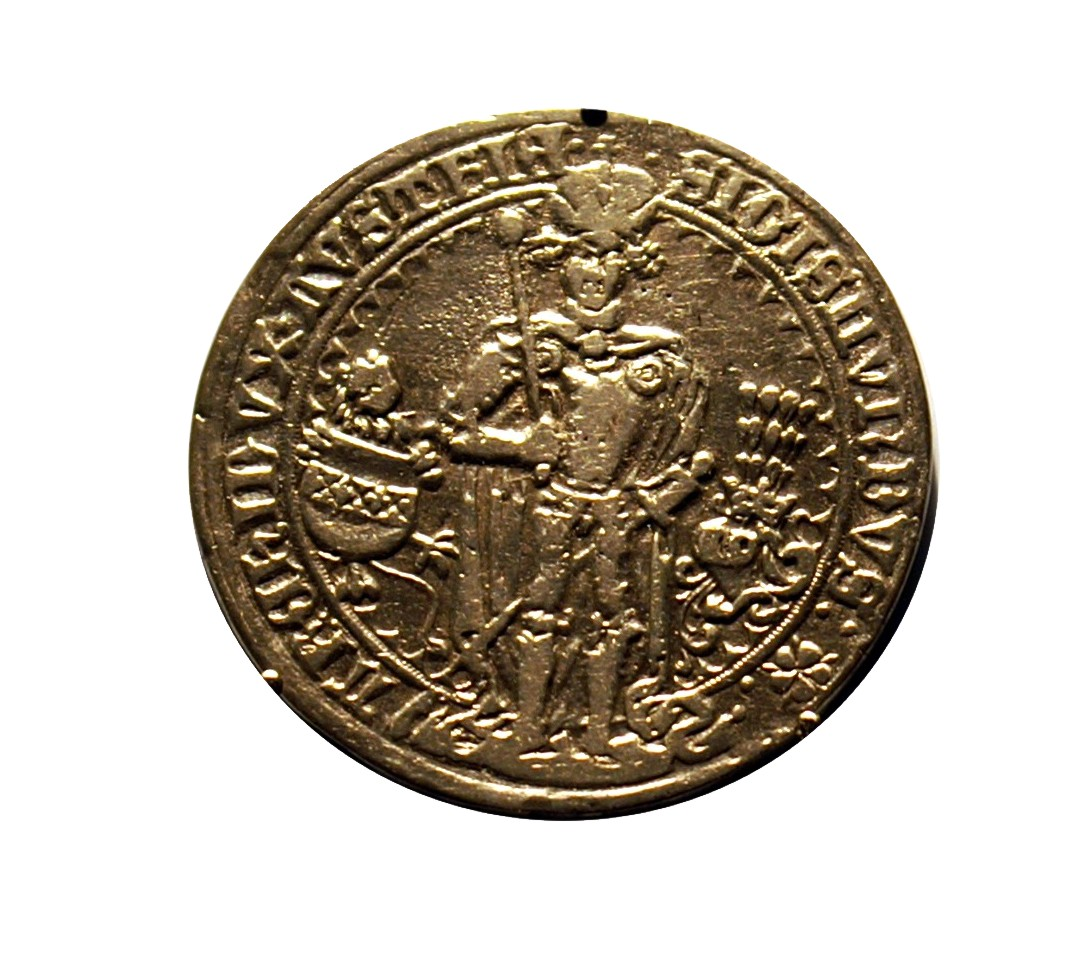 Tirol, Erzherzog Sigismund (1475-90), Guldengroschen